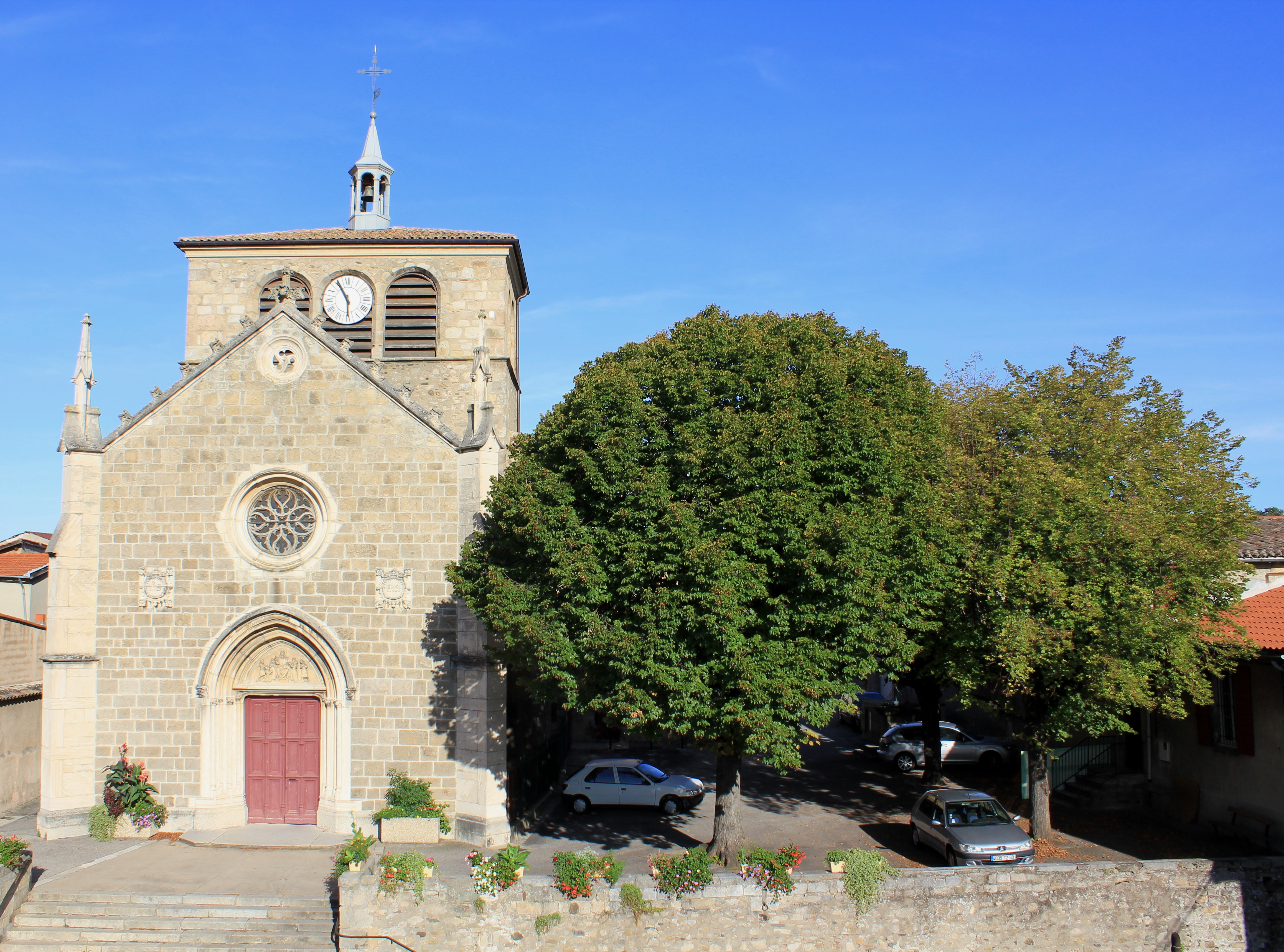 C'est l'église de Millery